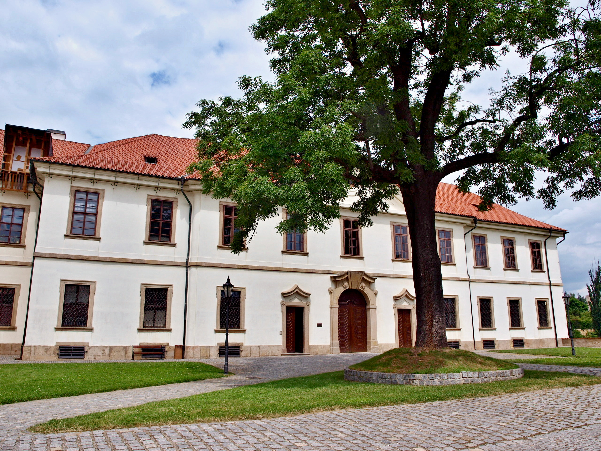 Břevnov klášter